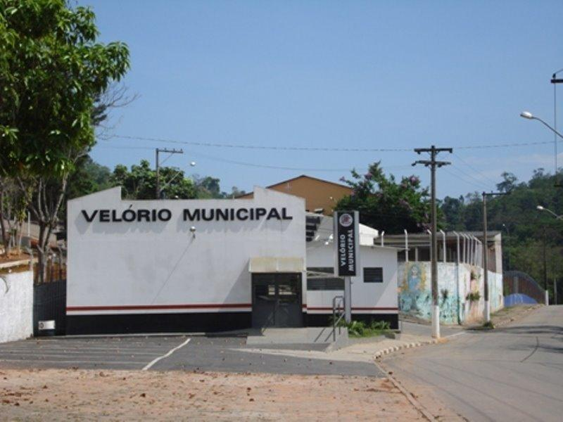 Velório Municipal de Santa Isabel, no estado brasileiro de São Paulo.